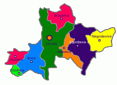 Gminy powiatu żagańskiego